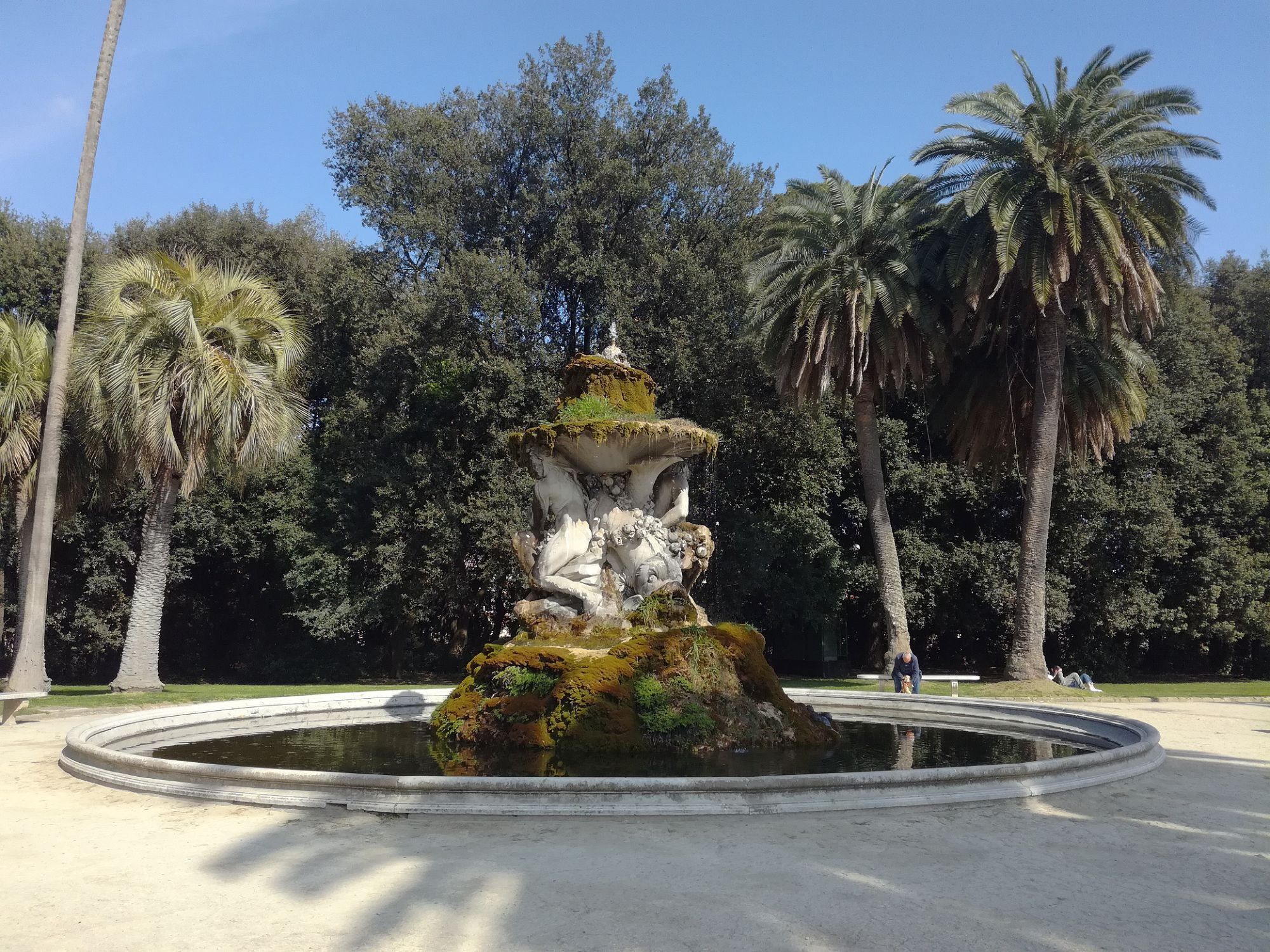 Fontana del Belvedere (Napoli)